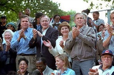 A família Bush reunida no pátio da Casa Branca em 3 de junho de 2001. Da esquerda para a direita: Barbara Bush, Jeb Bush (governador da Flórida), ex-presidente George H.W. Bush, Laura Bush e o Presidente George W. Bush.